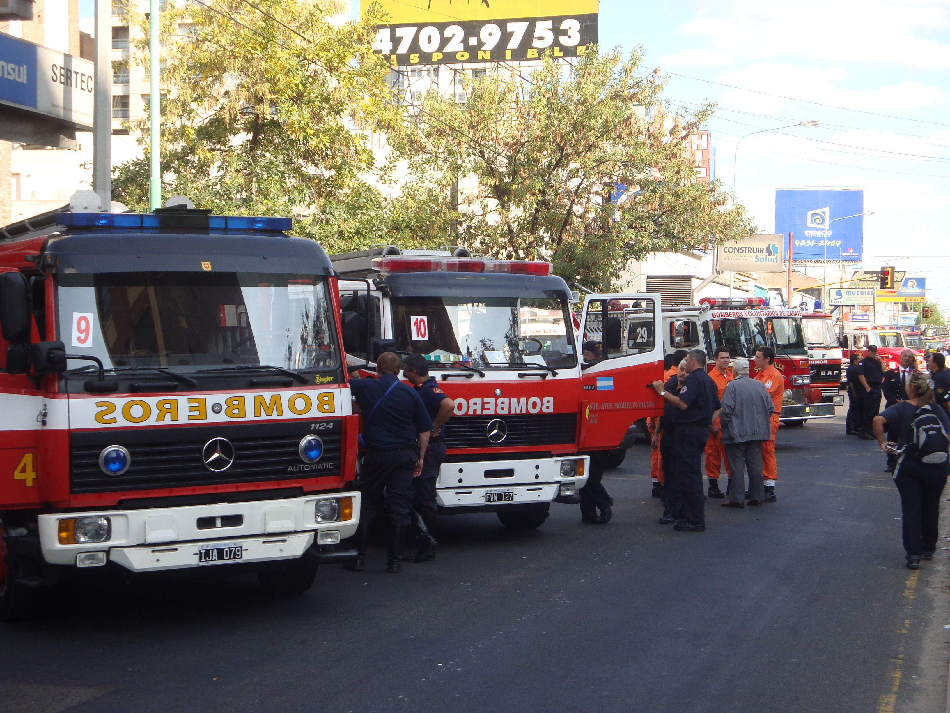 Camiones de bomberos apostados sobre la Avenida Hipólito Yrigoyen.